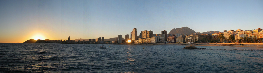 Bonita puesta de sol en Benidorm durante las fiestas locales. Pretty sunset in Benidorm during the local celebrations.